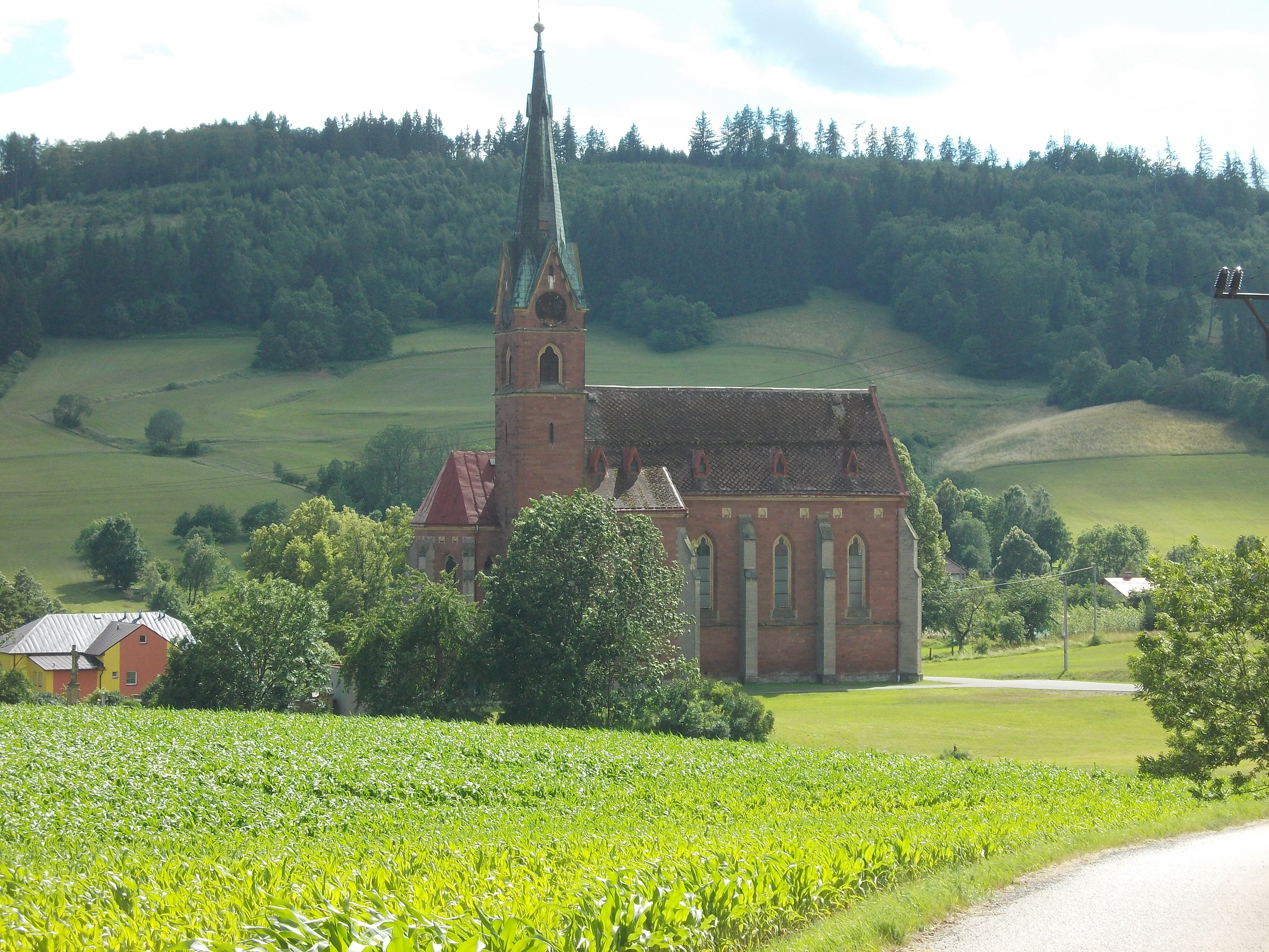 Zálesní Lhota - kostel, pohled z návrší (od severovýchodu)